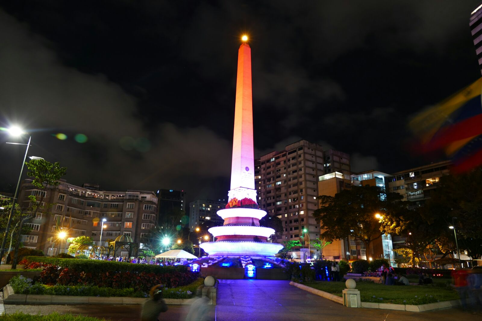 El Obelisco de la Plaza Francia, es iluminado honrando a los fallecidos por los atentados de Paris